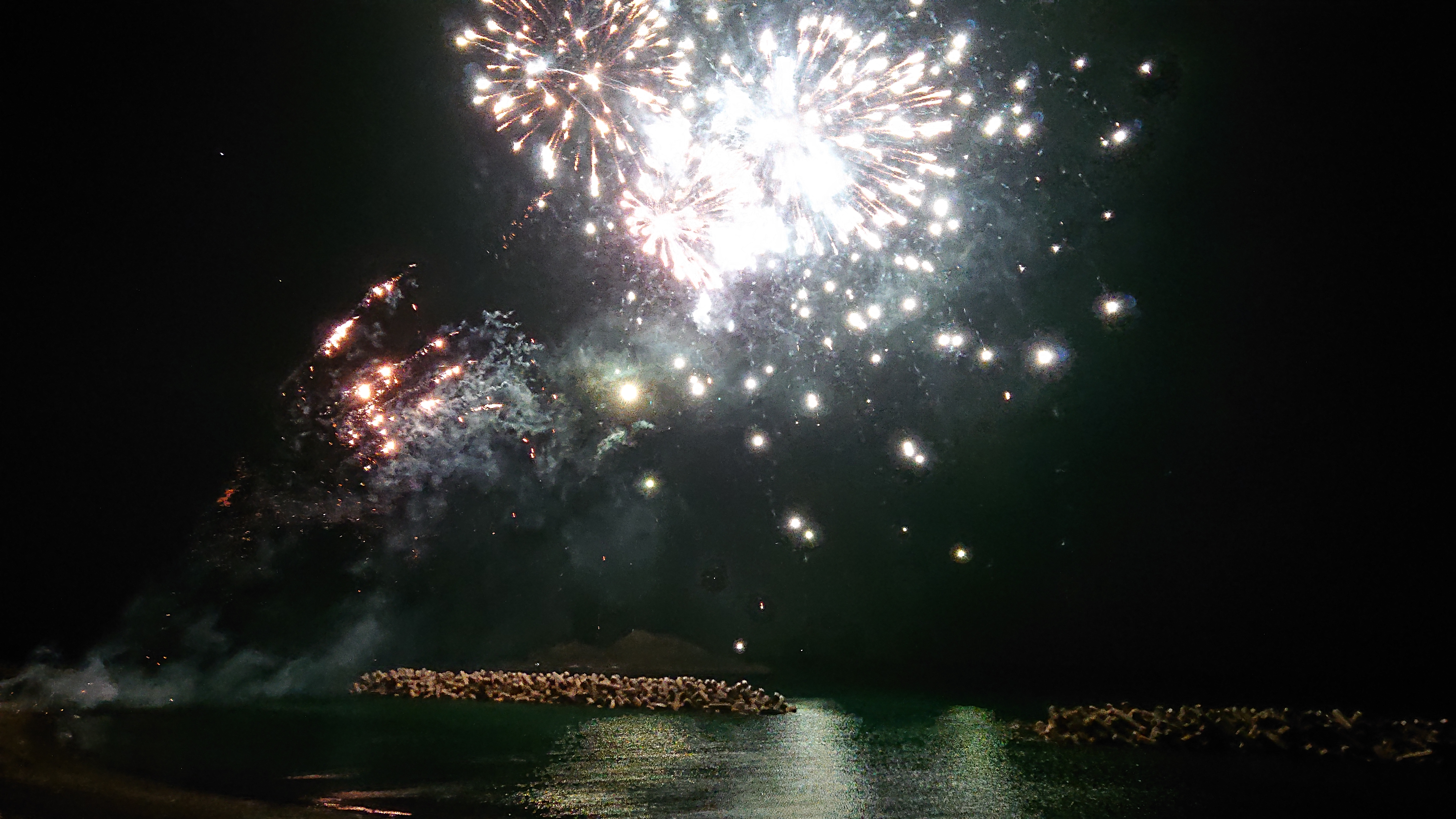 八峰町雄島花火大会